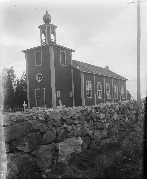 Kyrkan från sydväst. Snabbinv.